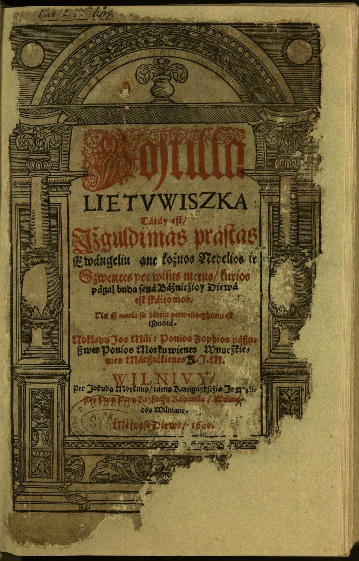 Postilla lietvwiszka, tátáy est Ižguldimás prástás ewángeliu ant kožnos nedelios ir szwentes per wisus metus, kurios págal buda sená bážnicžioy Diewá est skáitomos